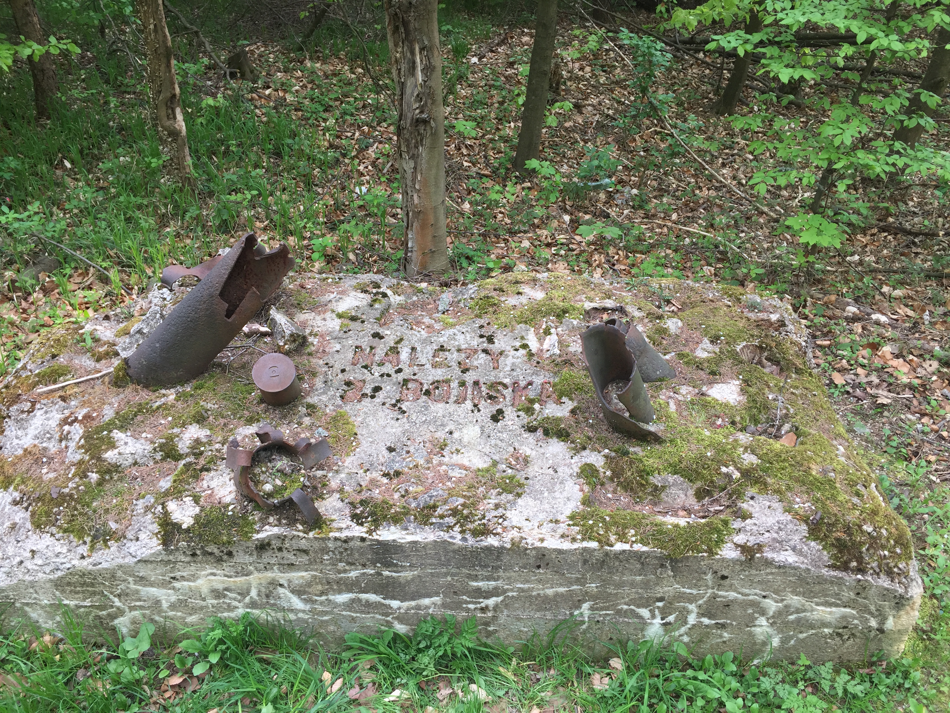 Pozostatky z bojiska